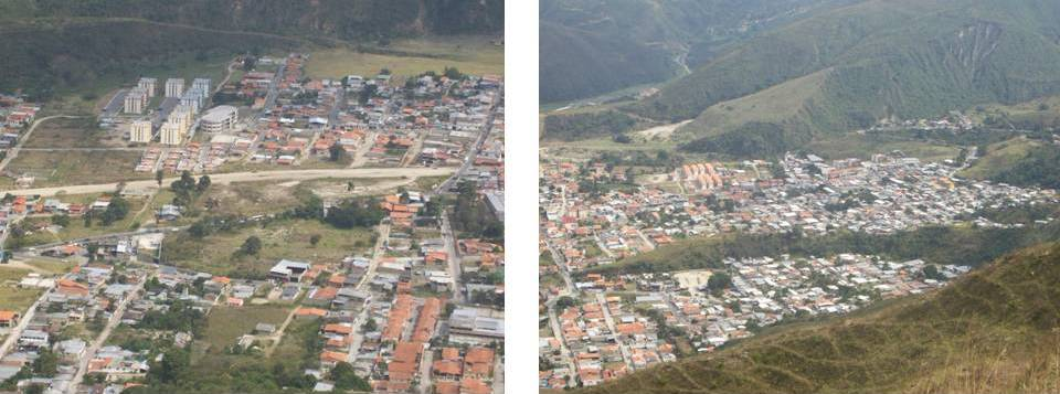 Vista de Tovar desde los Pinos